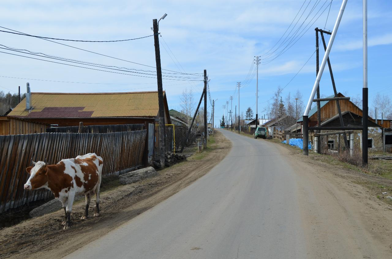 Село Старая Табага, городской округ Якутск